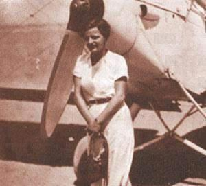 لطفية النادي أول كابتن طيار مصرية